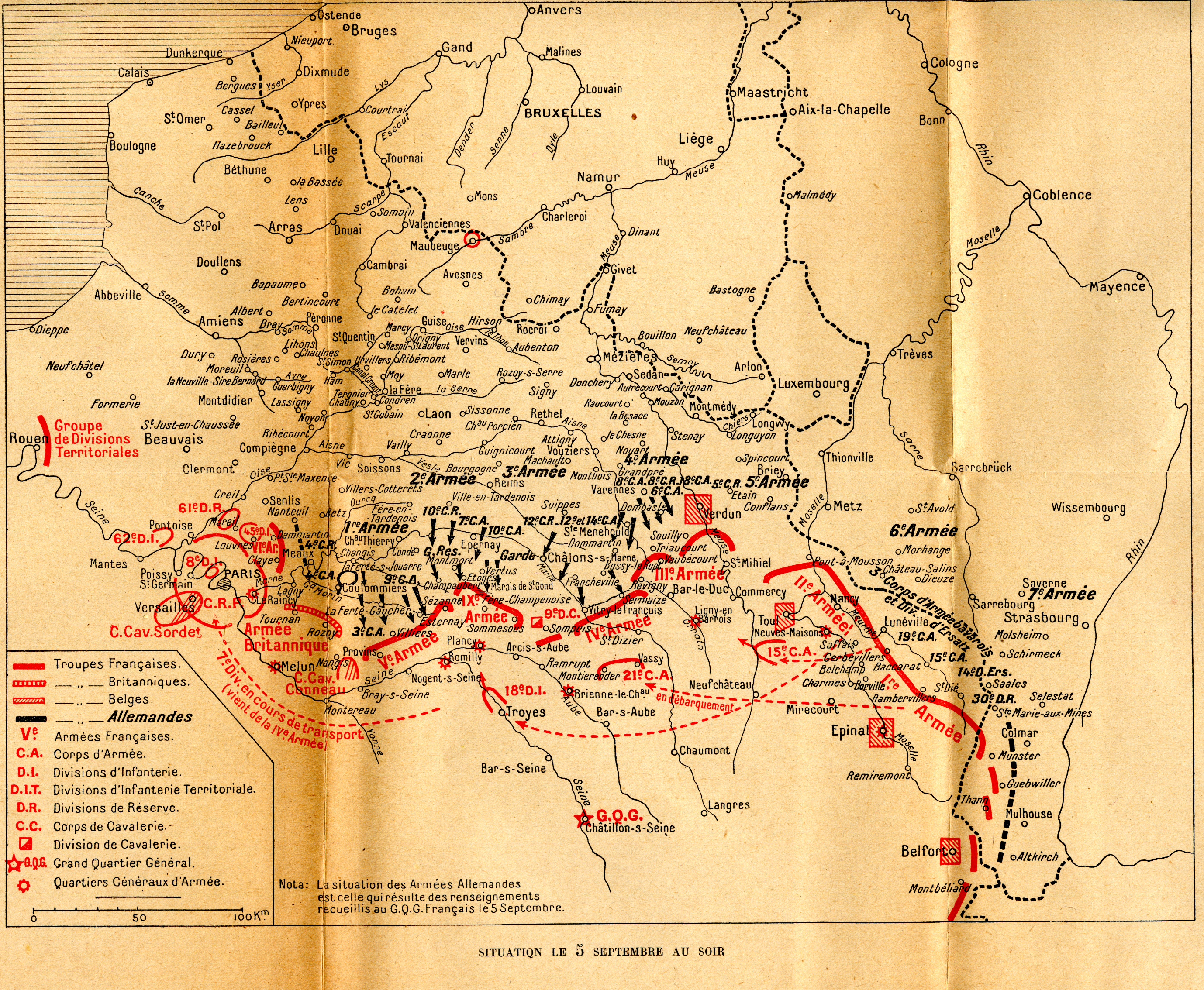 Cartes des positions des armées belge, françaises, britannique et allemandes au 5 septembre 1914, pendant la bataille de la Marne, pendant la Première Guerre mondiale, avec indication des armées, GQG et QG d'armées, d’après les informations du GQG français (pas forcément exactement la réalité donc, surtout en ce qui concerne les armées allemandes). Tirées des mémoires du maréchal Joffre, publiées à titre posthume. Référence complète : Joseph Joffre, Mémoires du Maréchal Joffre (1910-1917), tome premier, Paris : Librairie Plon, 1932